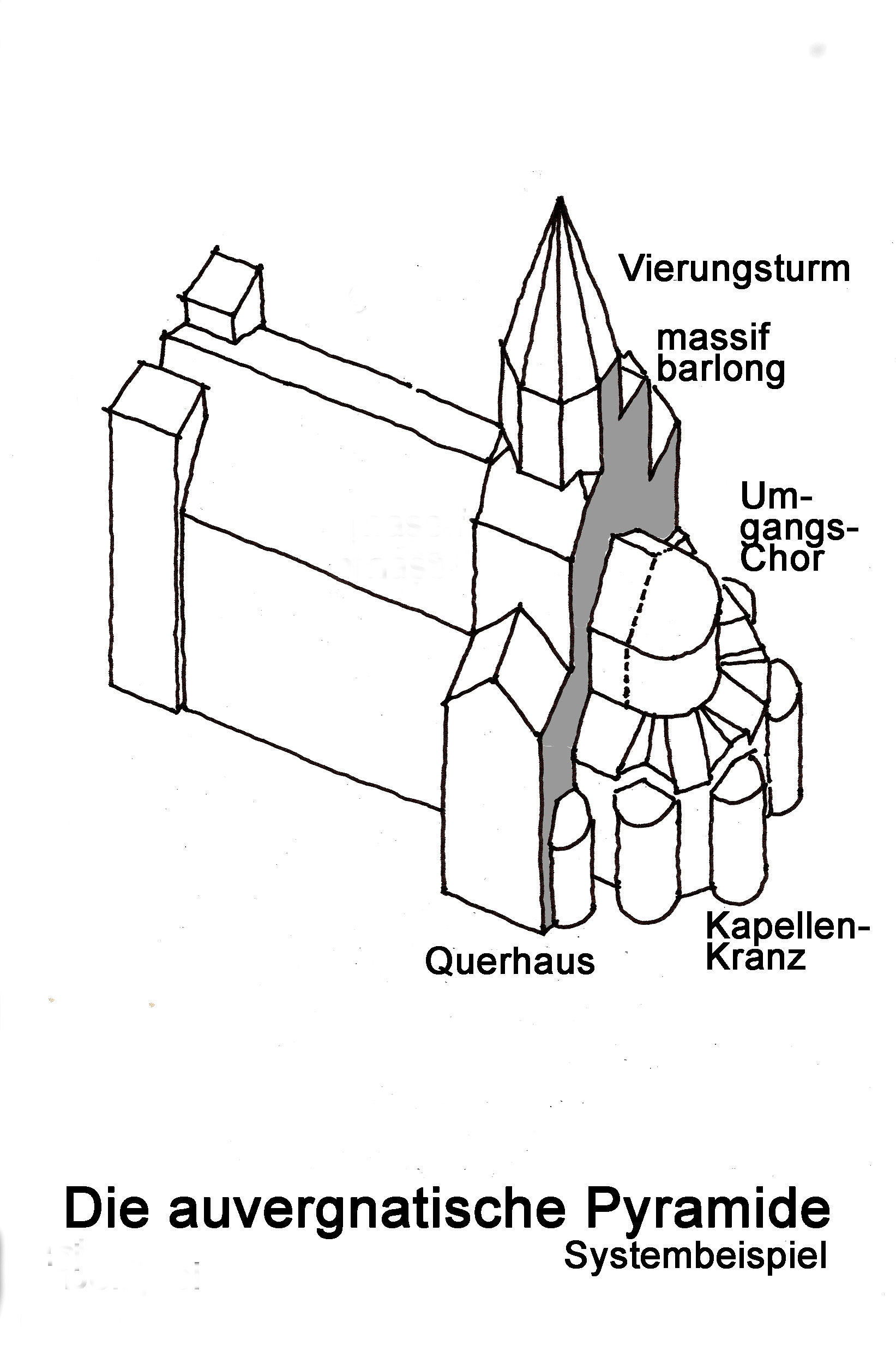 Die auvernatische Pyramide, Systembeispiel, Handskizze